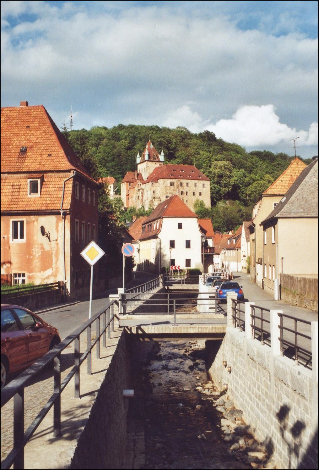 Liebstadt: Blick aus dem Seidewitztal (Bereich Zimmlerstraße/Bachstraße) auf Schloss Kuckuckstein.